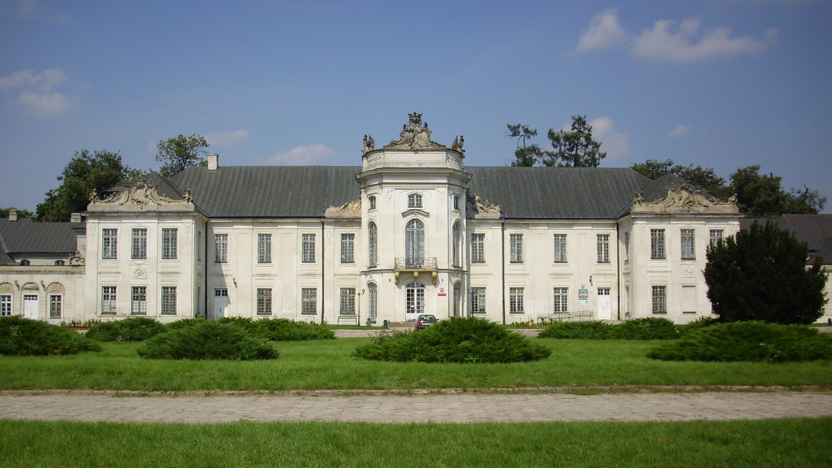 Radzyń Podlaski (woj. lubelskie, Polska). Pałac.